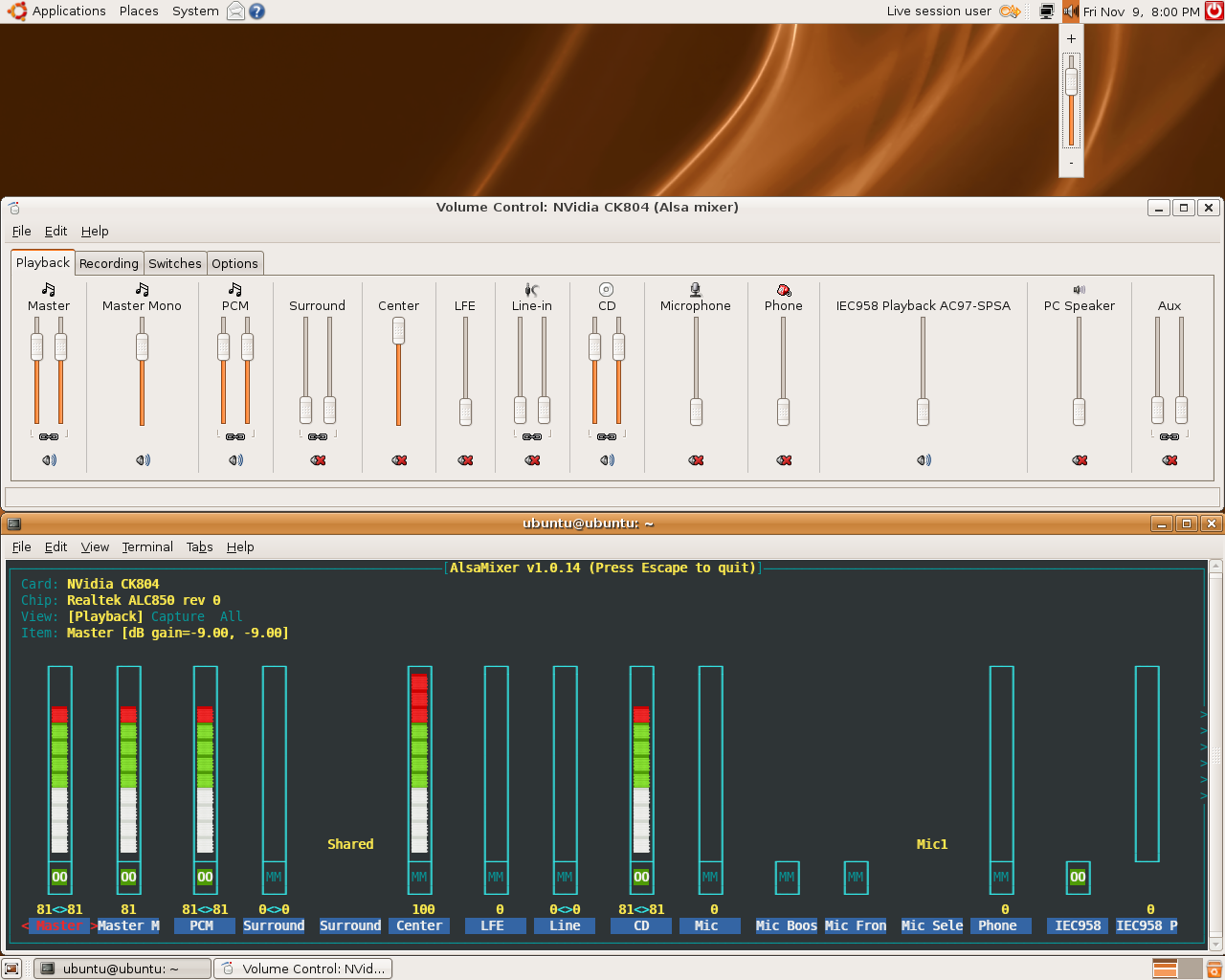 ALSA v1.0.14 under Ubuntu 7.10 (en)